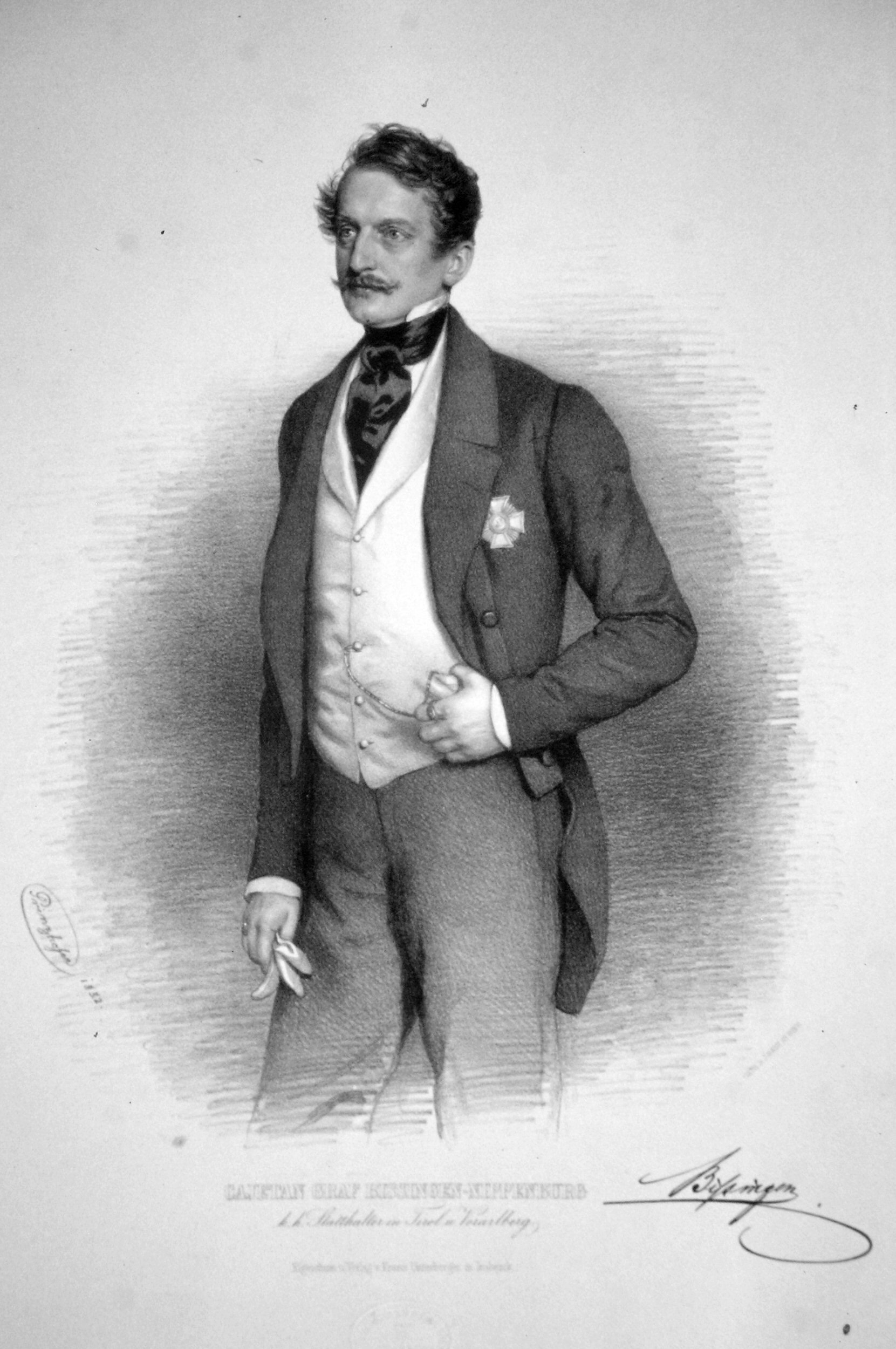 Kajetan Bissingen-Nippenburg, Lithographie von August Prinzhofer